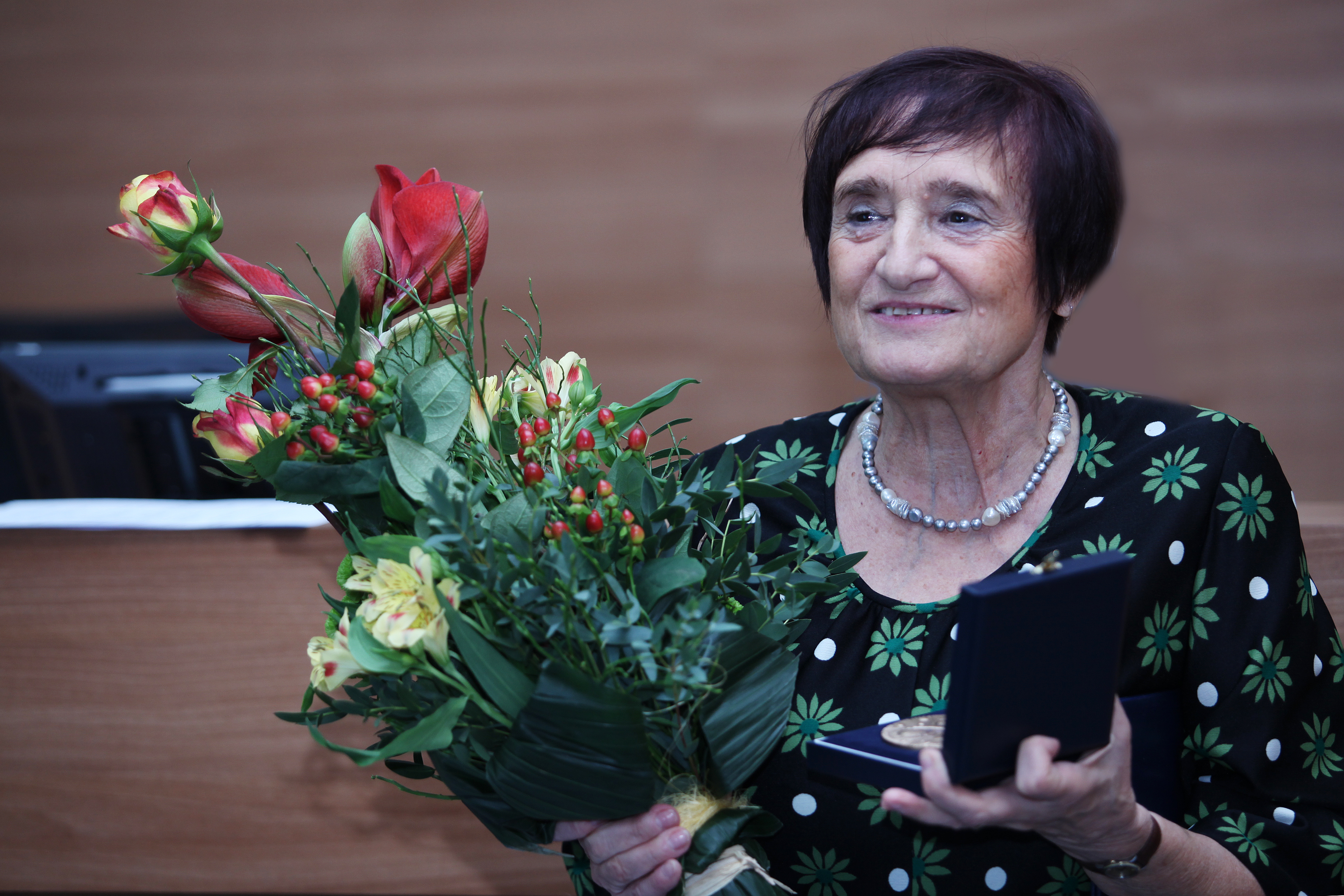 Blanka Říhová (* 21. října 1942 Praha) je česká vědkyně, imunoložka specializující se na výzkum směrovaných léčiv v rámci terapie nádorových onemocnění, mikrobioložka a bývalá ředitelka Mikrobiologického ústavu Akademie věd České republiky. Pro funkční období 2018–2020 se stala předsedkyní Učené společnosti České republiky.